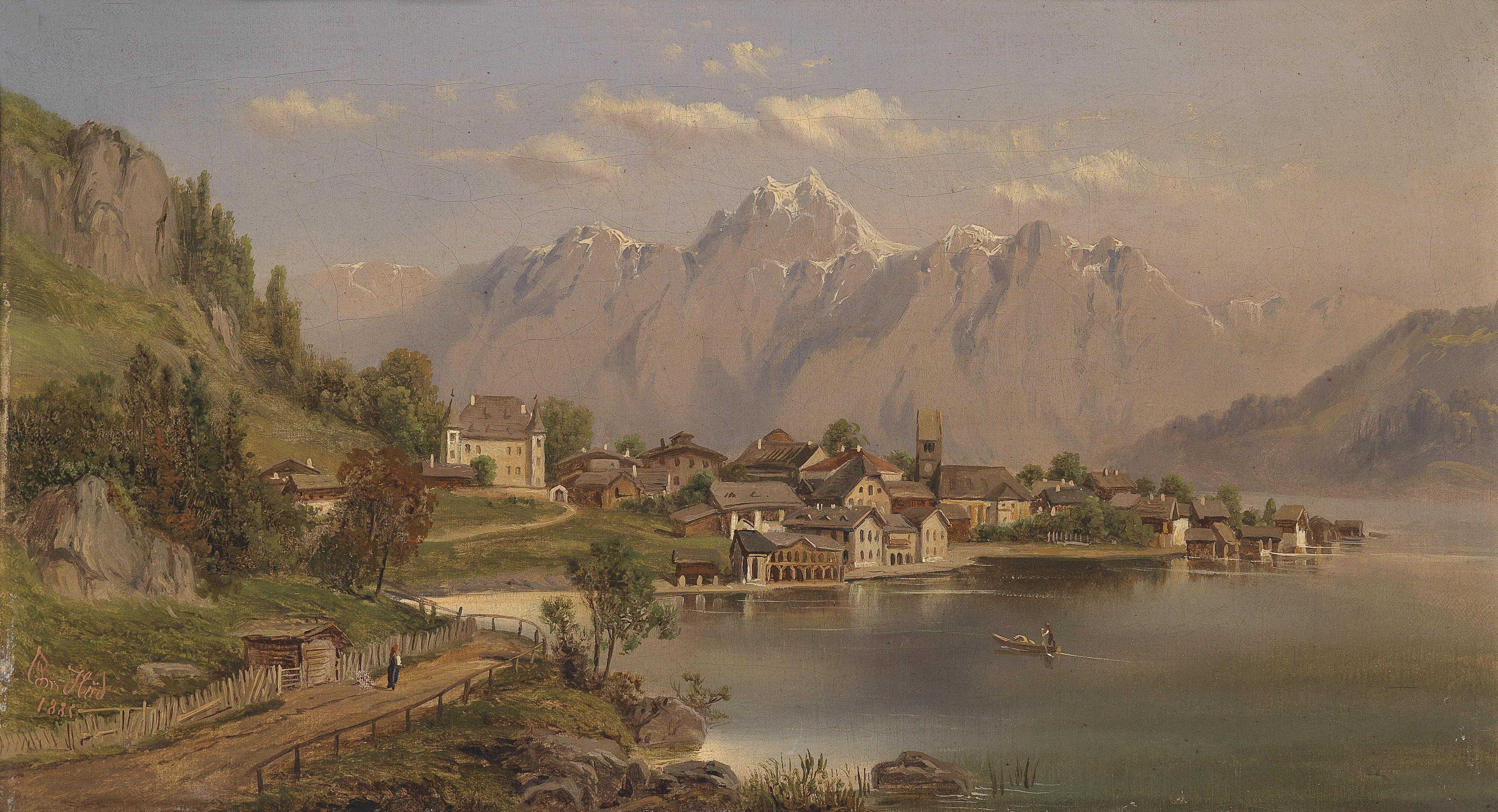 Blick auf Zell am See.title QS:P1476,de:"Blick auf Zell am See." label QS:Lde,"Blick auf Zell am See."